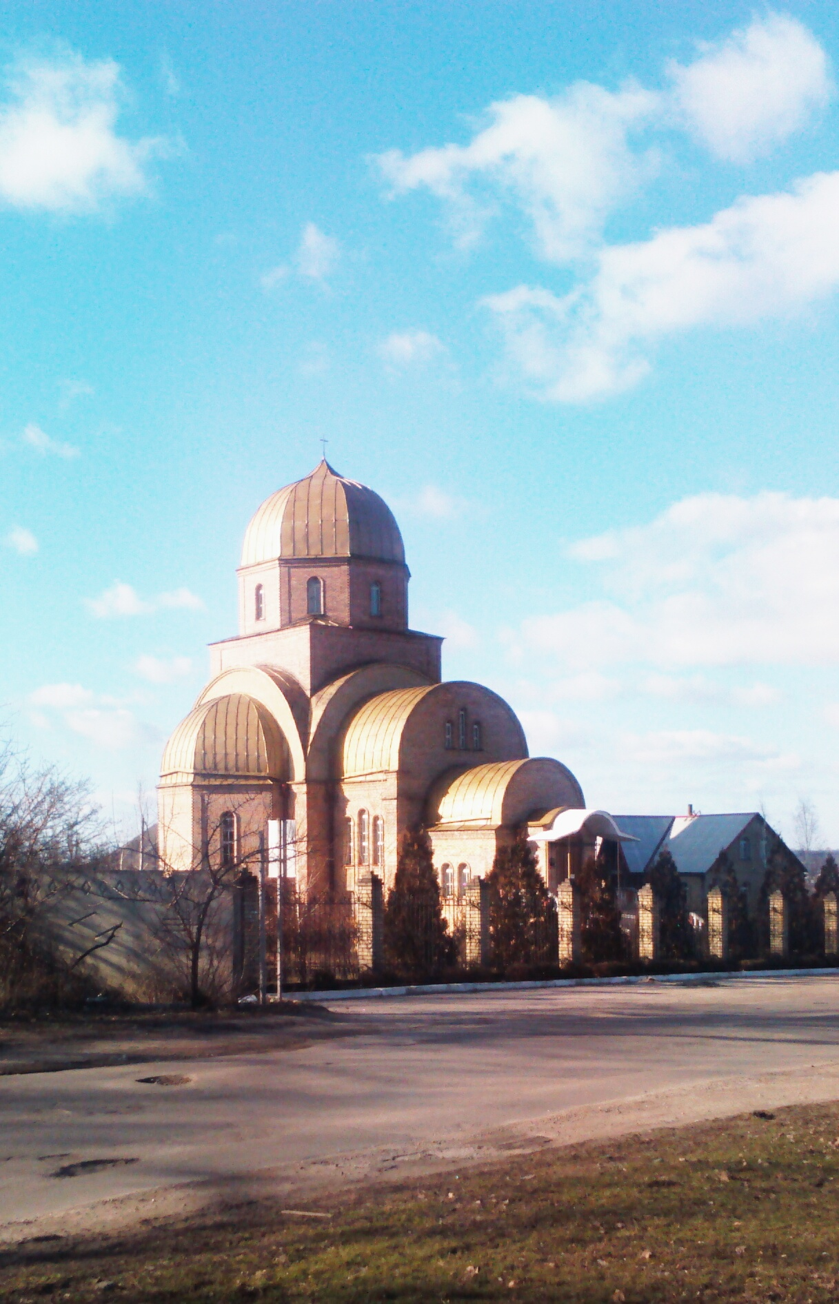 Церква ЄХБ Церкви Церква Євангельських Християн Баптистів України Донецька Добропілля